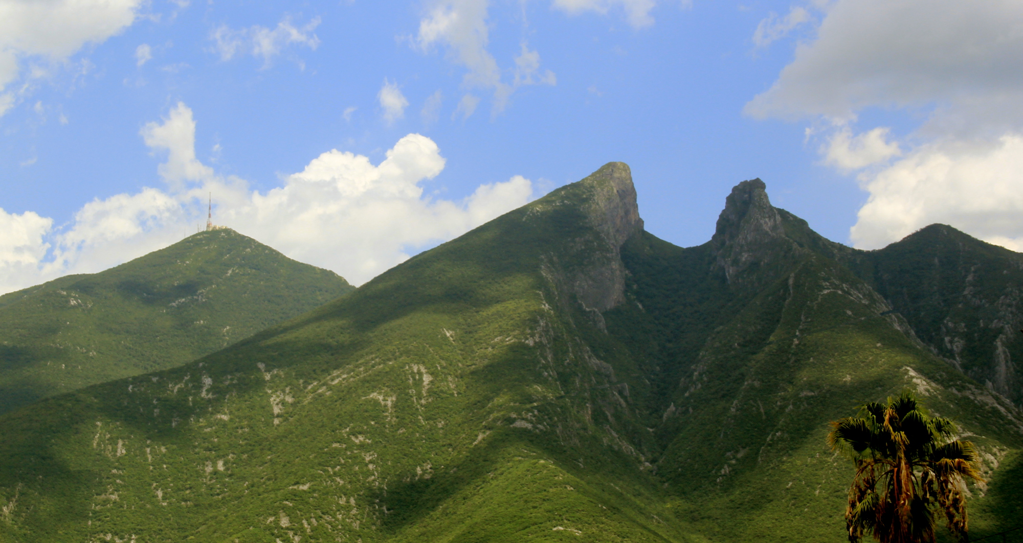 Cerro de la Silla Monterrey Mexico